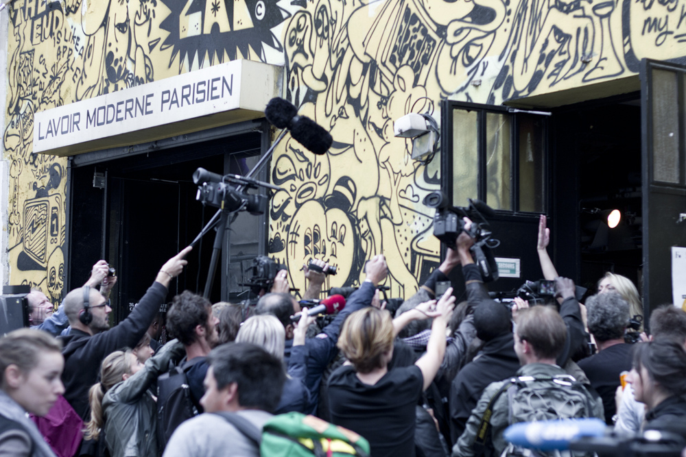 femen protest in Paris